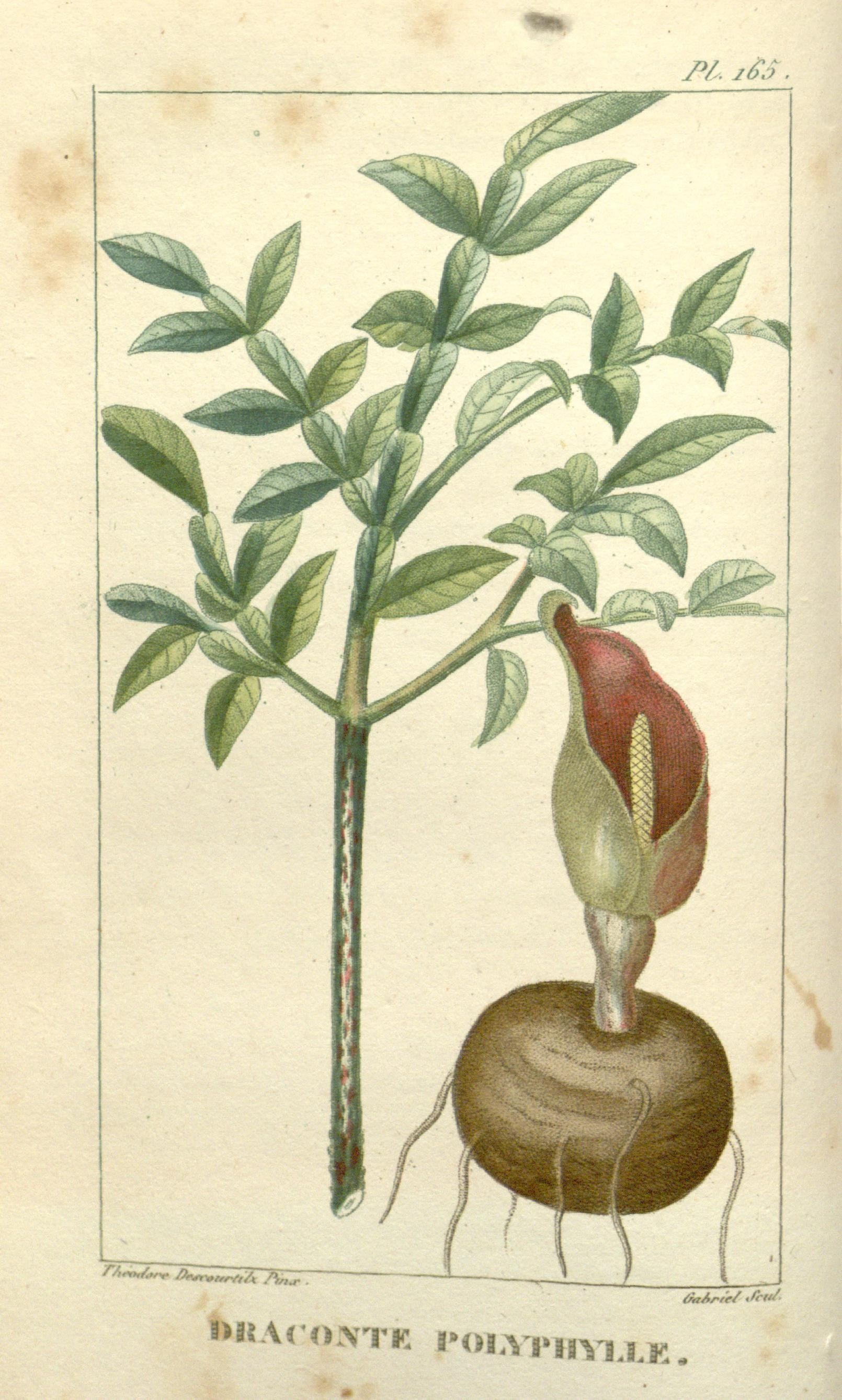 M. j^S tiuAriW rll/ «HAOKNTK IM.I.M.„^i,K